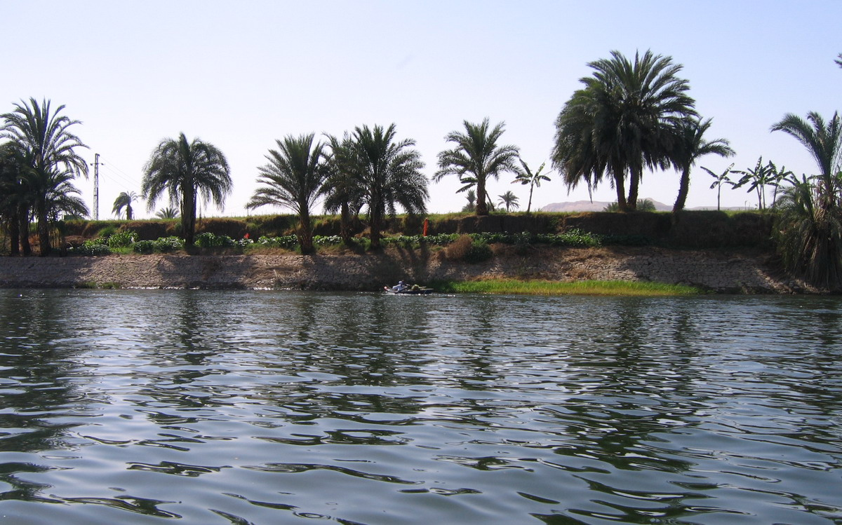 Autoriaus nuotrauka, 2006.04.14. Nilo pakrantė. Vakarinis krantas ties Tėbais. Nuotrauka gali būti platinama pagal GFDL licenciją.